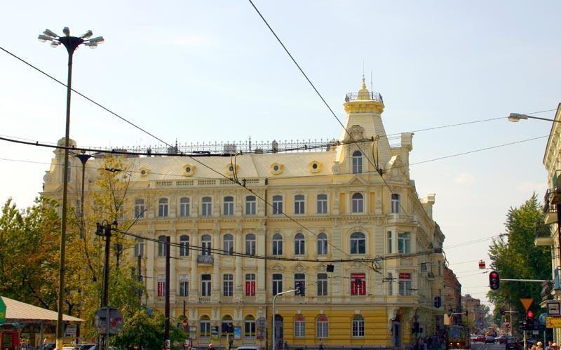 Aleja Kościuszki, Łódź